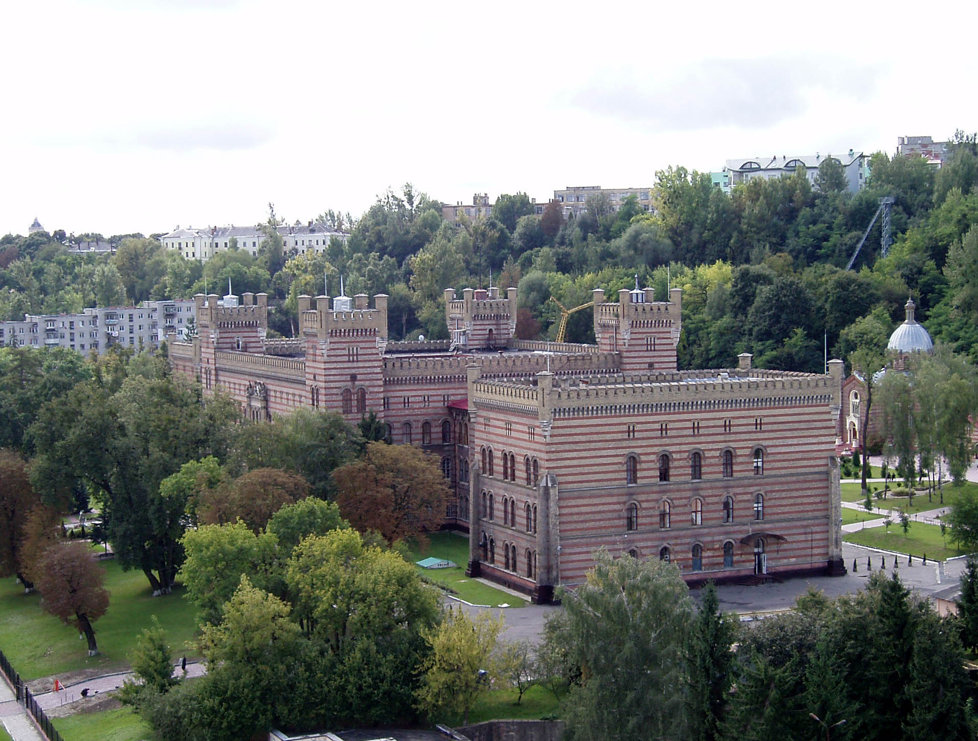 Львівський державний університет безпеки життєдіяльності на вулиці Клепарівській у Львові. Початково збудований як Дім військових інвалідів за проектом Феофіла ван Гансена.